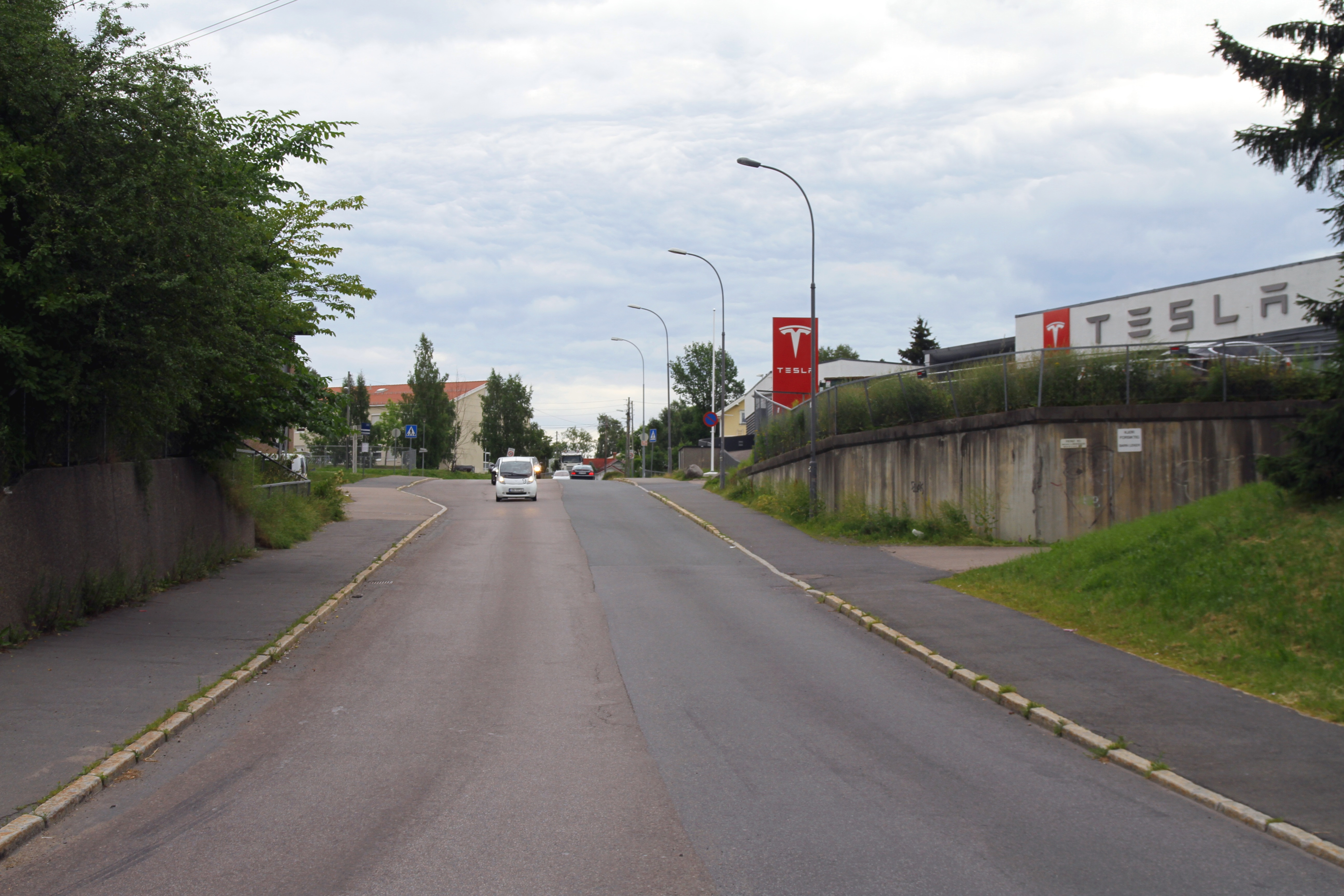 Bekkenstenveien i Oslo